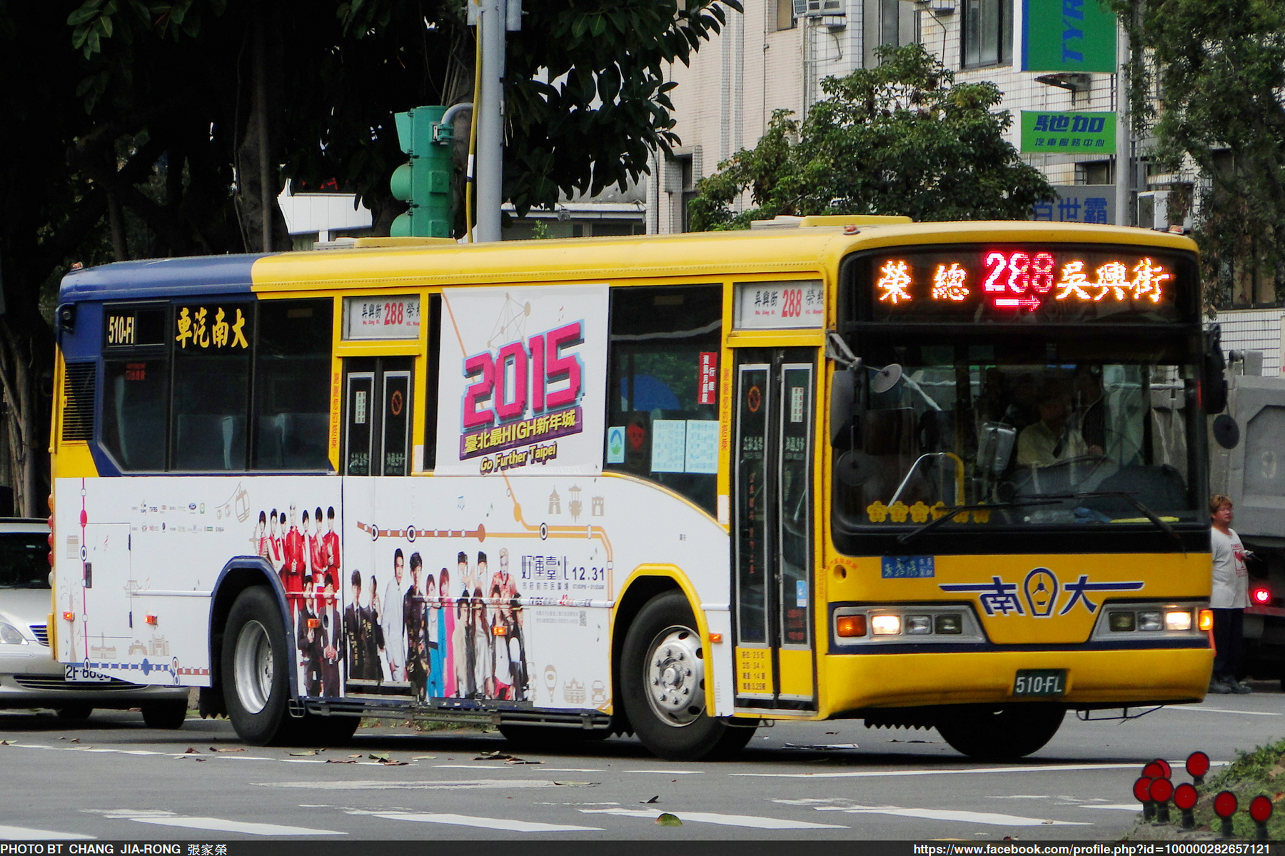 大南汽車2007年日野ERK1JRL大客車510-FL，右側貼臺北市政府2015臺北最HIGH新年城廣告。